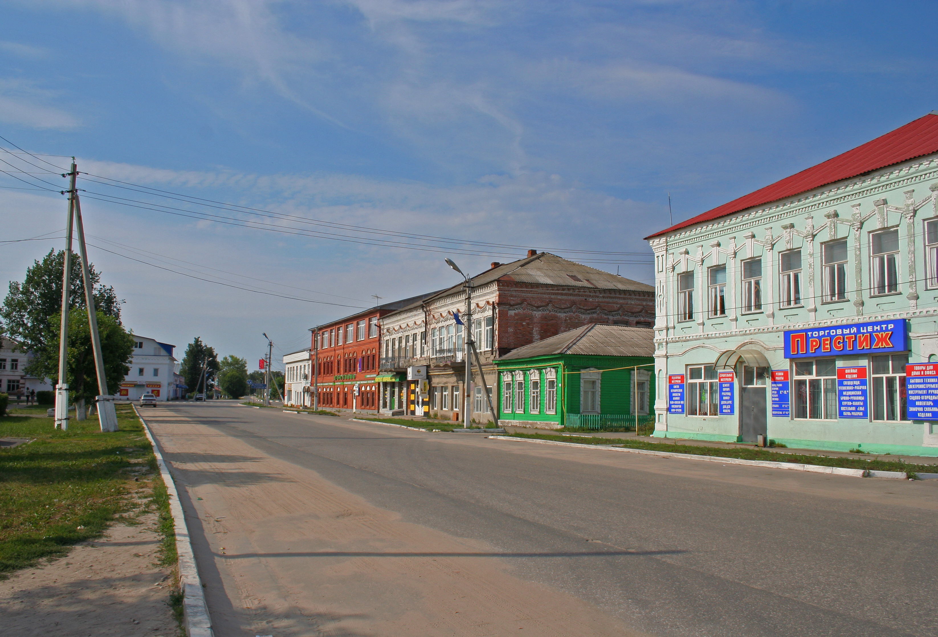 Stadt Spas-Klepiki (Oblast Rjasan, Russland). Stadtansichten.